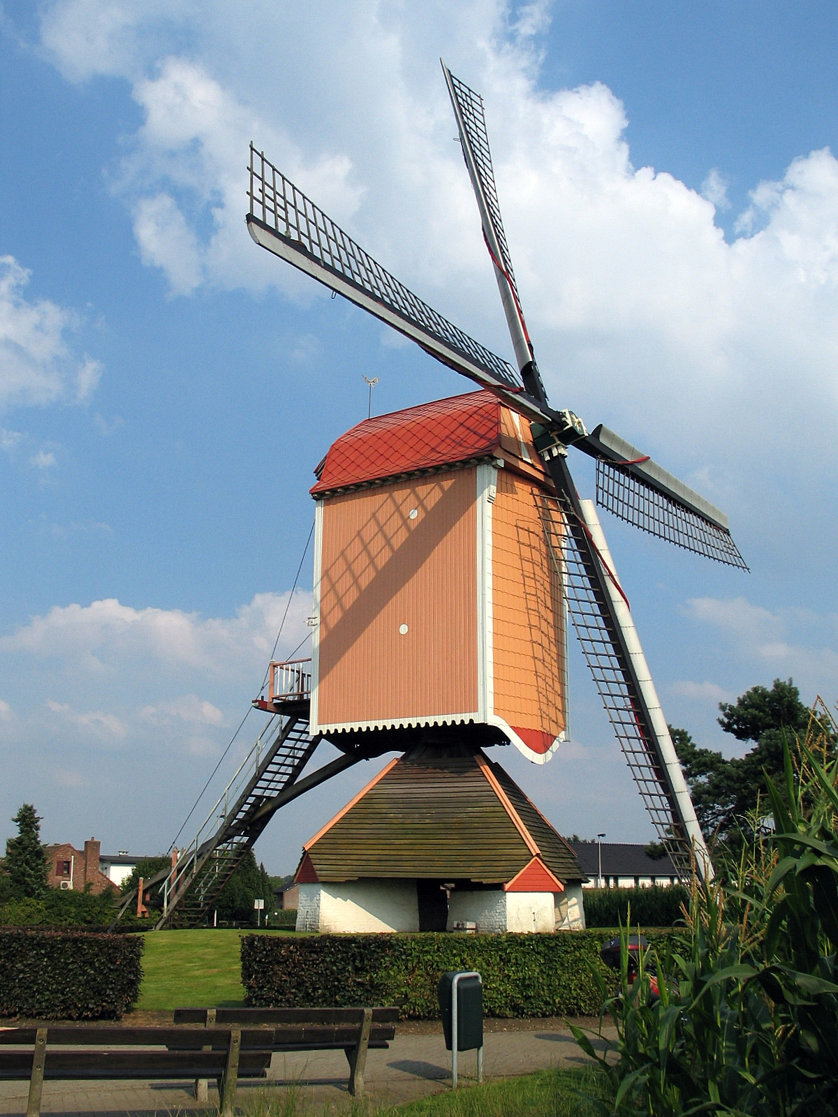 Standerdmolen Nieuw Leven uit 1801 in Leut, Maasmechelen, België